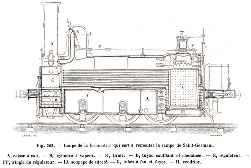 Coupe verticale, avec légendes, du type de locomotive à vapeur utilisées sur la ligne de Saint Germain (France) après l'abandon du chemin de fer atmosphérique en 1859.